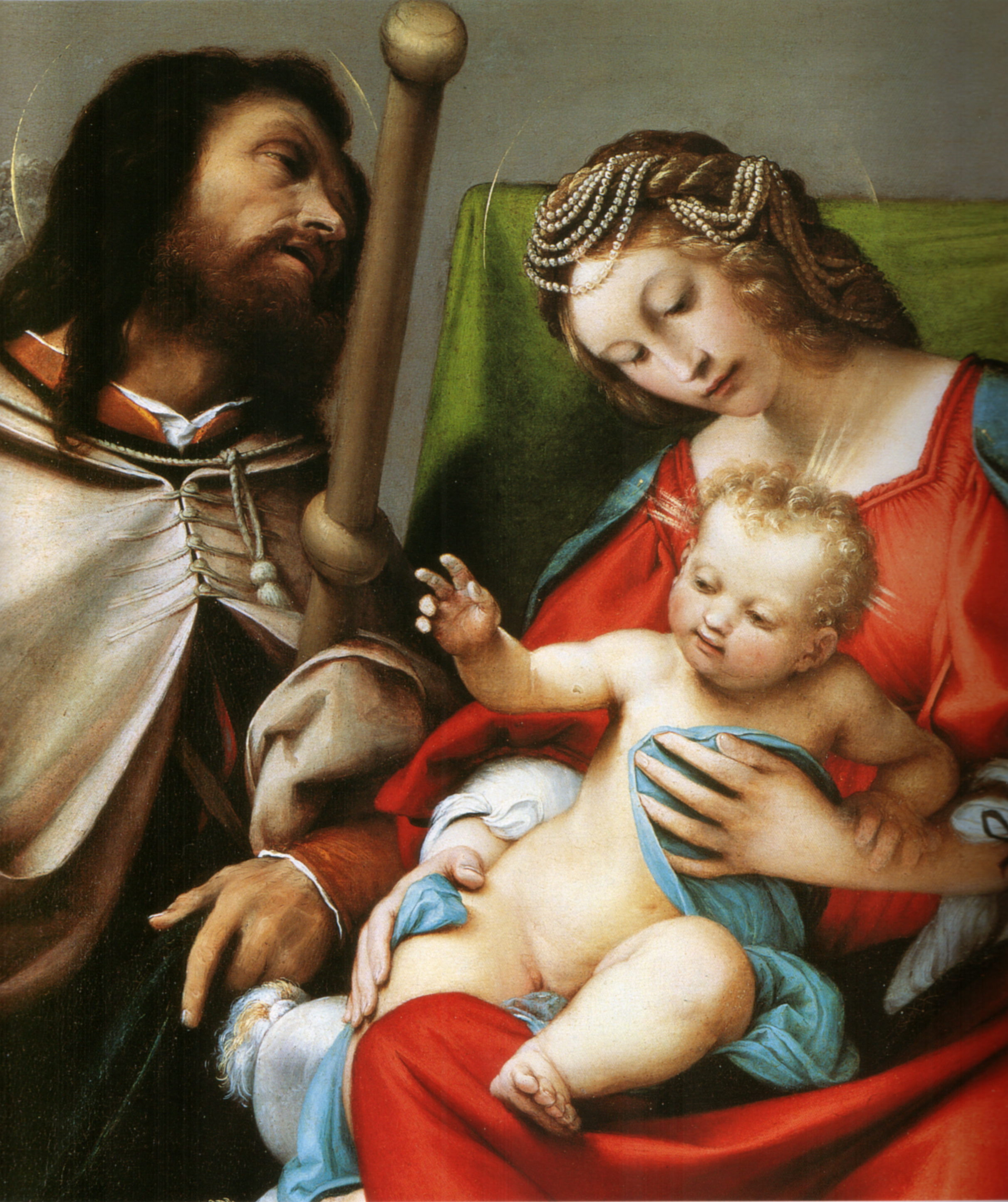 detail